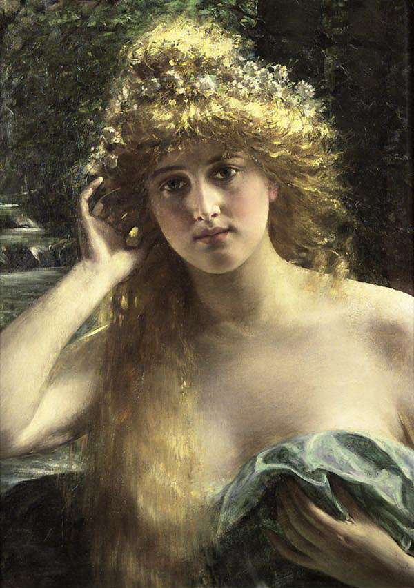 Mädchenporträt. Öl auf Leinwand, signiert, 74.5 x 60 cm